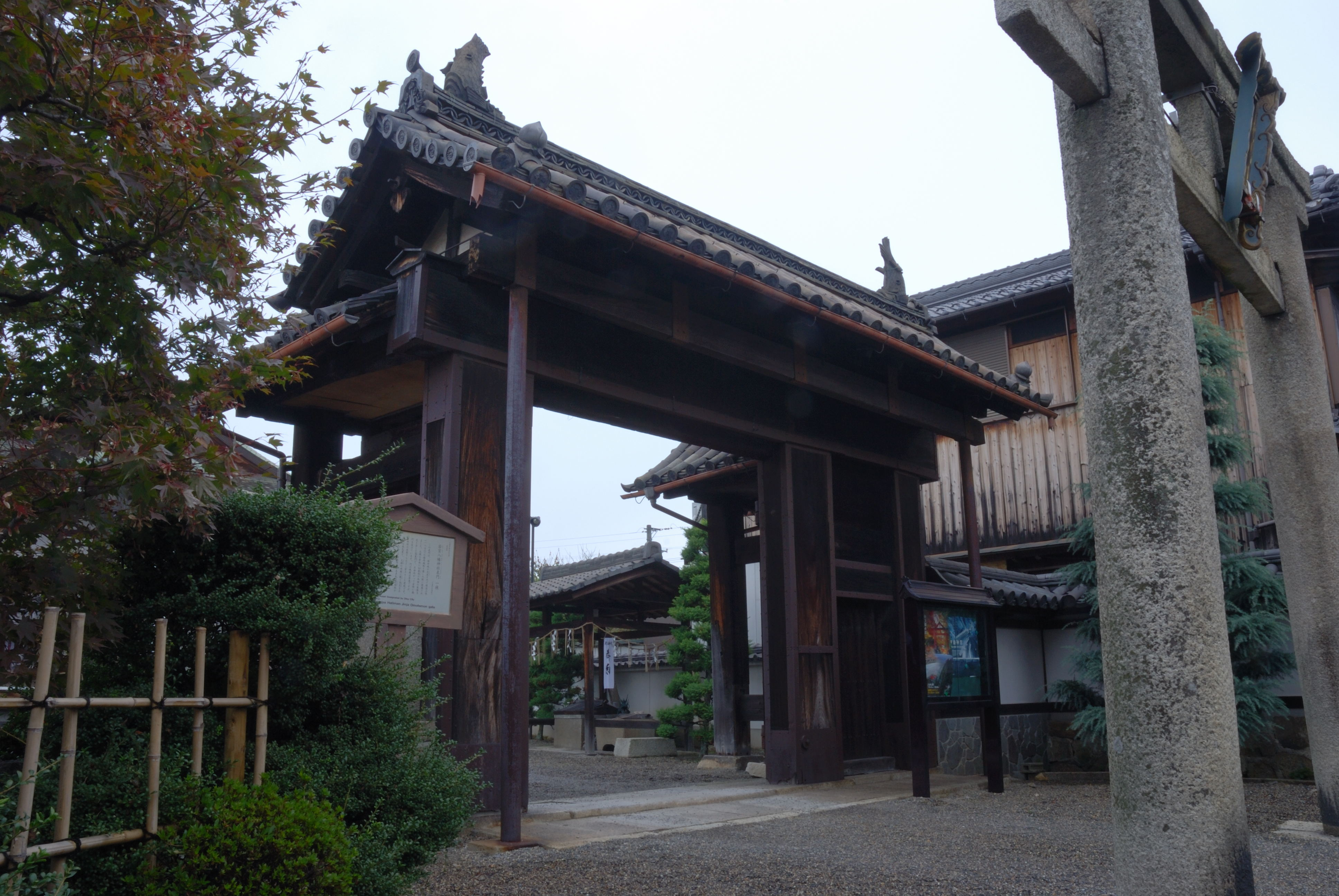 Zeze castle inubashirimon